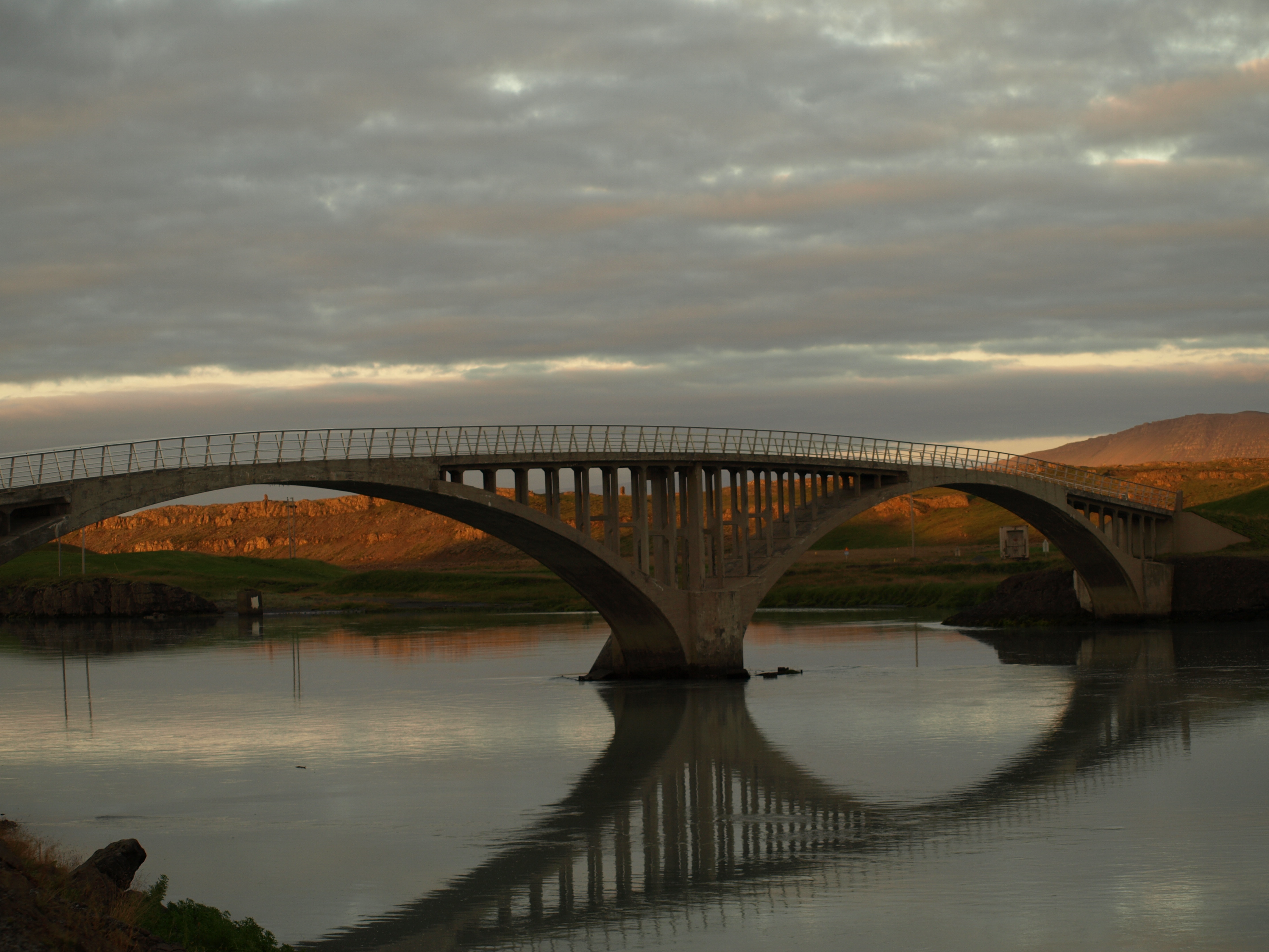 Hvítárbrú við Ferjukot